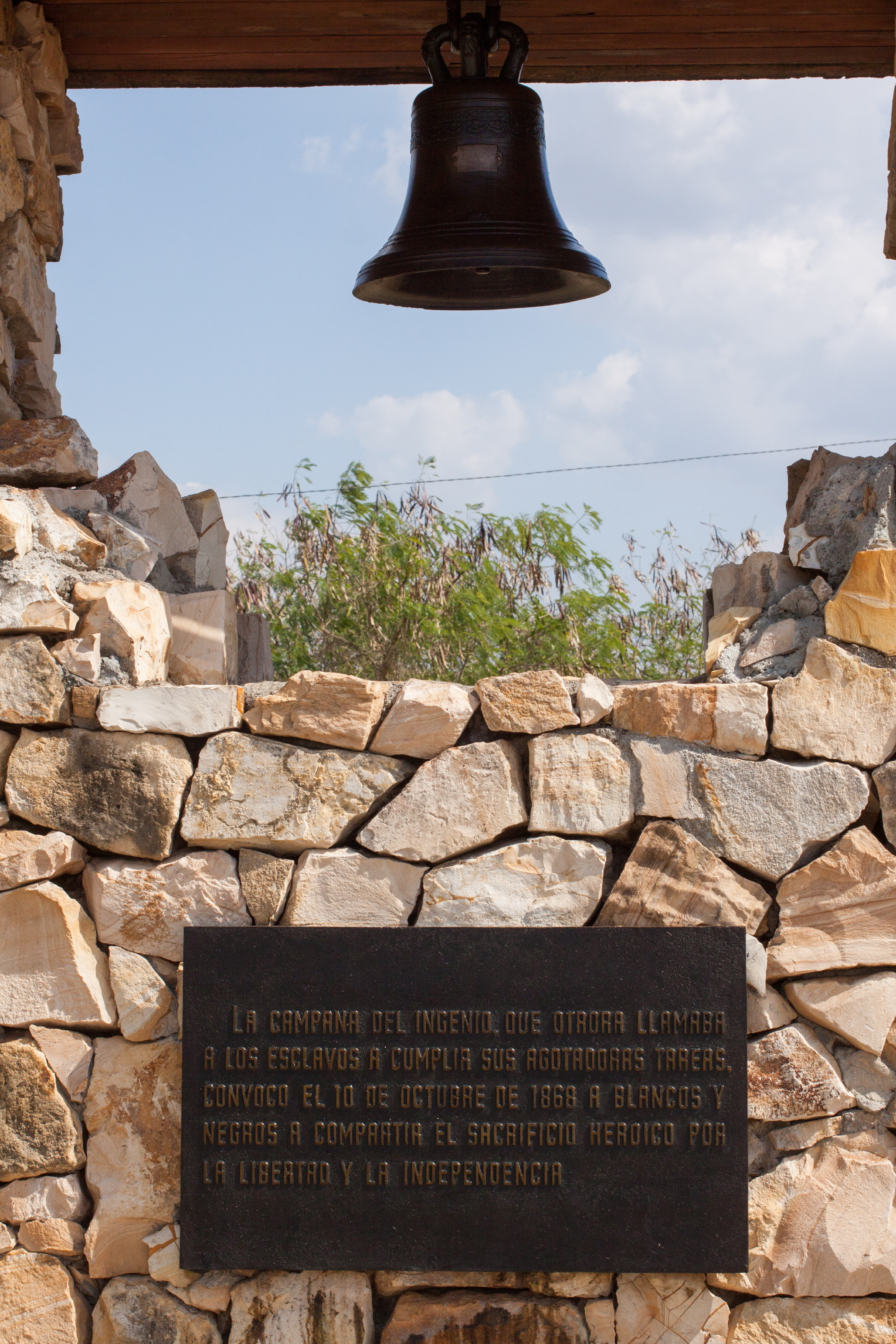 Glocke der Farm La Demajagua mit der die Sklaven erst zur Arbeit, dann von Carlos Manuel de Céspedes zum Aufstand gegen die Spanier gerufen wurden. Kuba